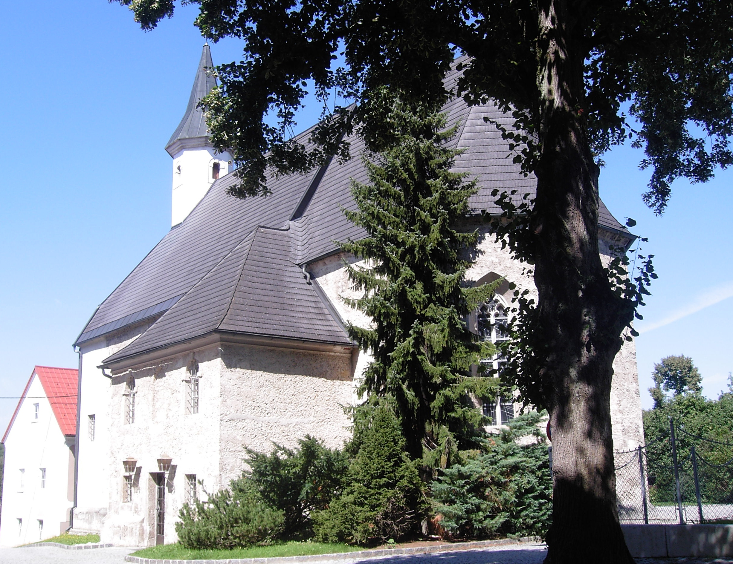 Bad Hall Margarethenkapelle Margarethenplatz 5, Ansicht Fassade Margarethenplatz